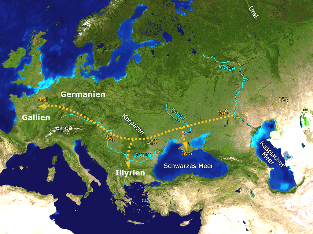 Beschreibung: Karte der Eroberungszüge der Hunnen in Europa Quelle: Public-Domain-Satellitenbild der NASA Fotograf oder Zeichner: Benutzer:Stw Andere Versionen: SVG auf Anfrage Billede:Hunnenwanderung.png